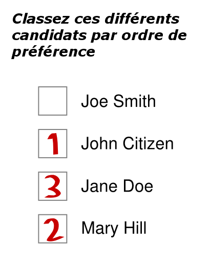 Exemple de bulletin de vote pouvant être utilisé lors d'une élection où le vote alternatif est en vigueur